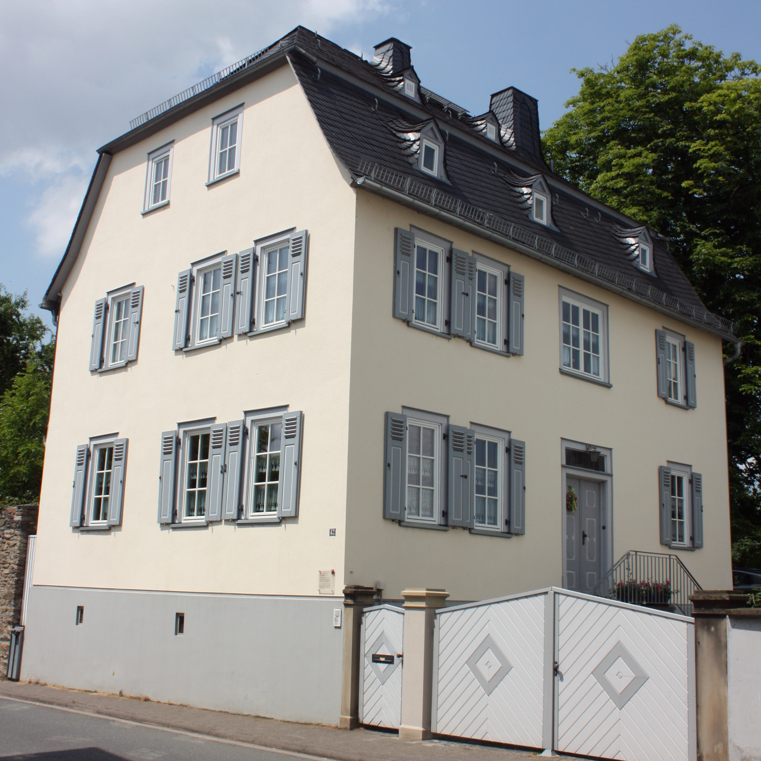 Kirberg, Hessen: Evangelisches Pfarrhaus von 1765/66. Wohnhaus von Christian Daniel Vogel